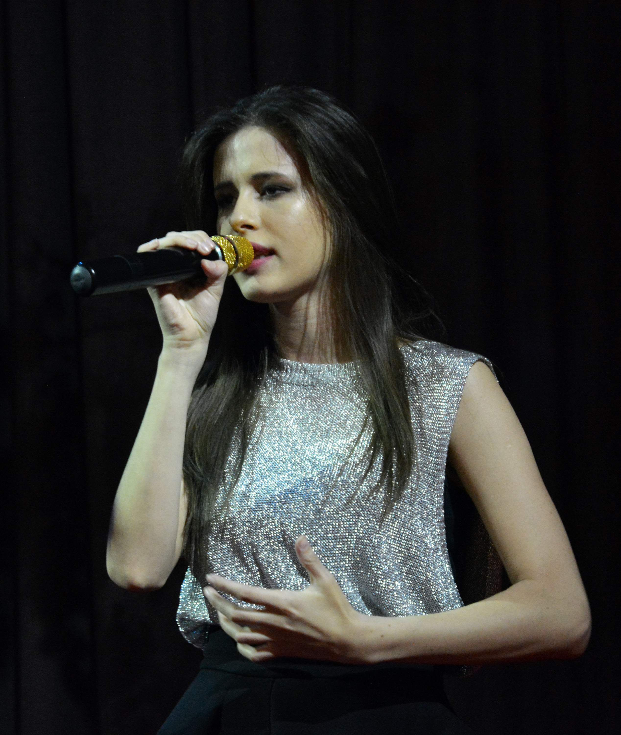 Elvira T на New Wave Junior Party